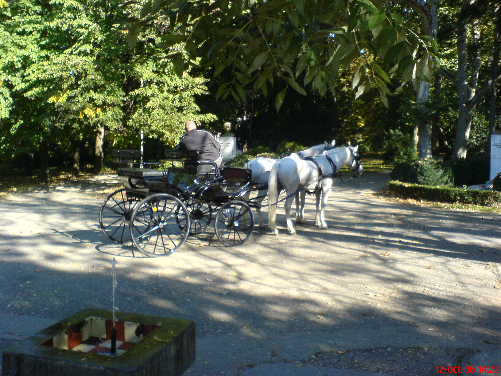 Кочије у парку у Вршцу.